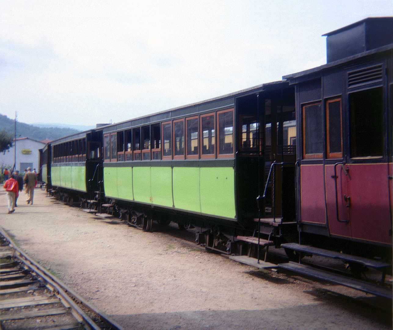 Les voitures ex-Sarthe / POC du chemin de fer du Vivarais, en gare de Lamastre (Ardèche) le 21 septembre 1975.